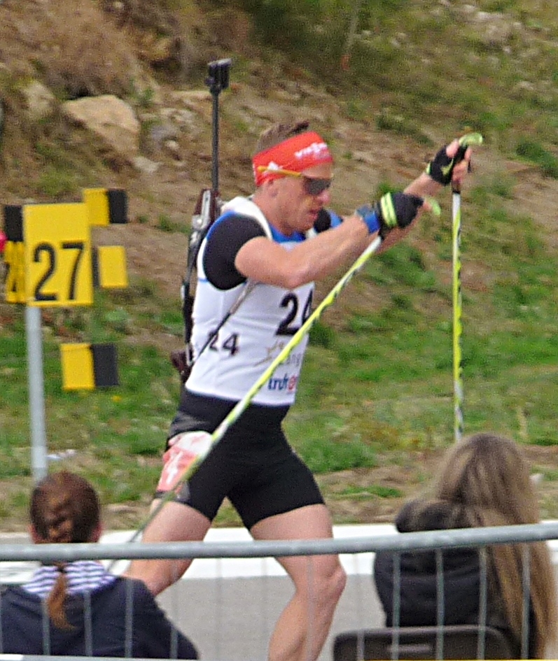 Florian Graf bei der Deutschen Biathlon-Meisterschaft 2015